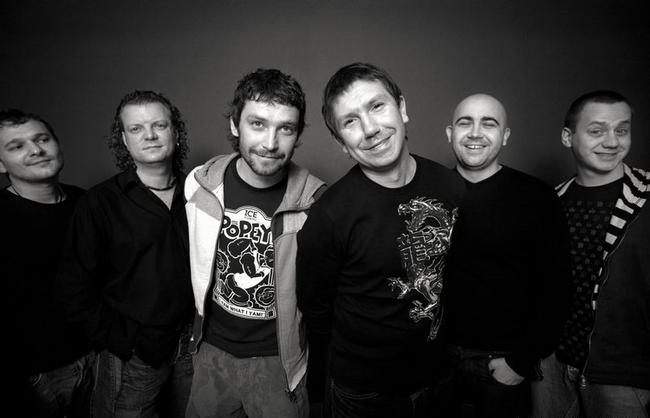 Группа "Uma2rmaH". Алексей Никишин.2008